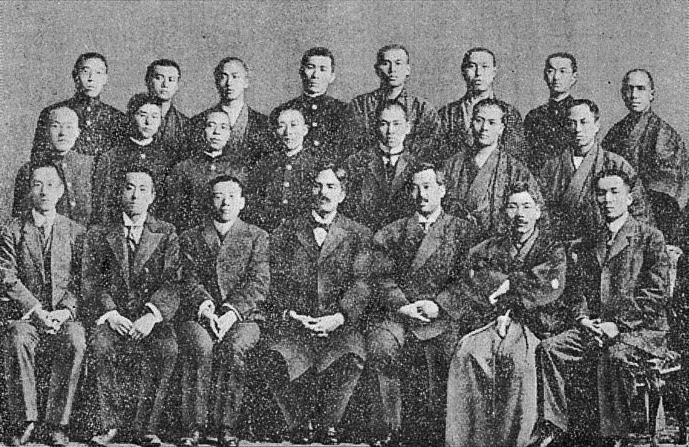 明治42年10月に結成された、第一高等学校、東京帝国大学の学生による聖書研究会